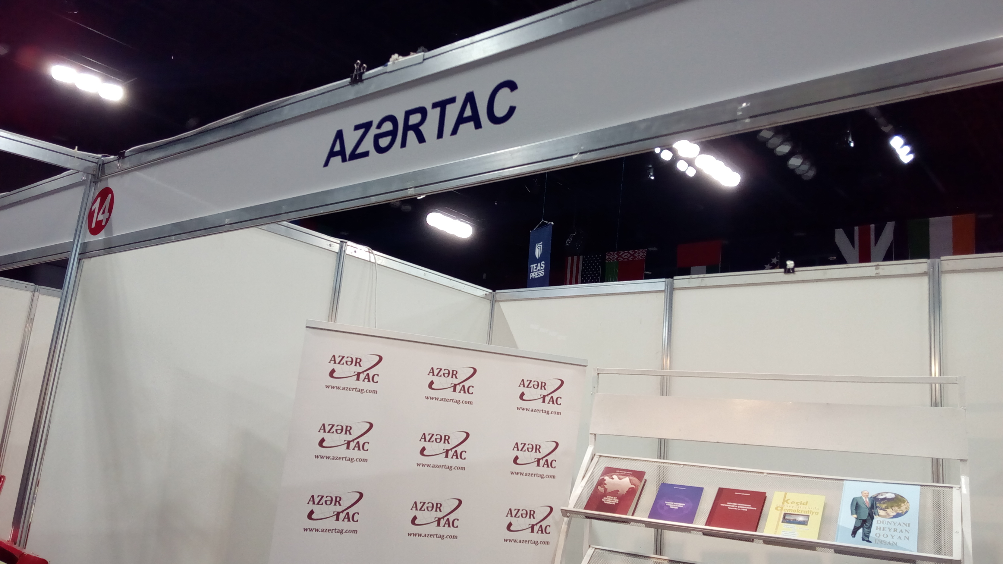 V Bakı Beynəlxalq Kitab Sərgi-Yarmarkası